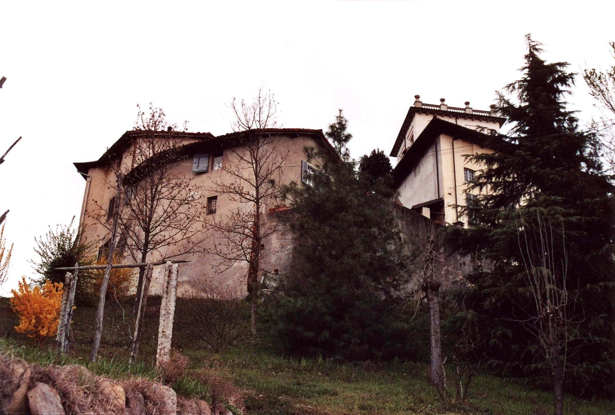 Fara Novarese (NO), Castrum Vetus o Castellone, vista dal basso.